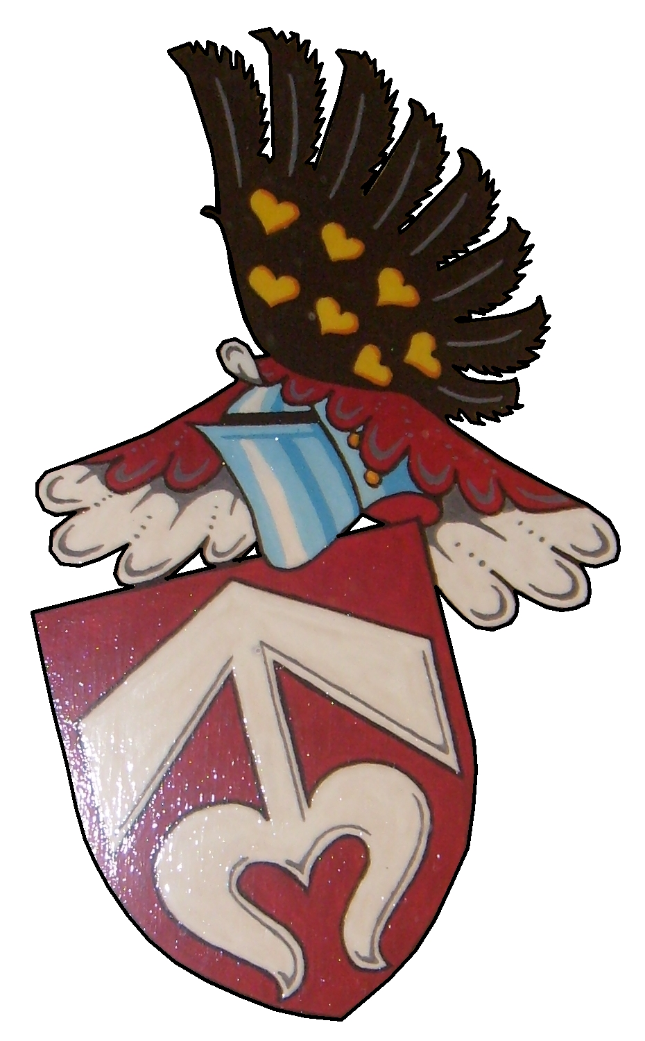 Erb pánů z Kravař